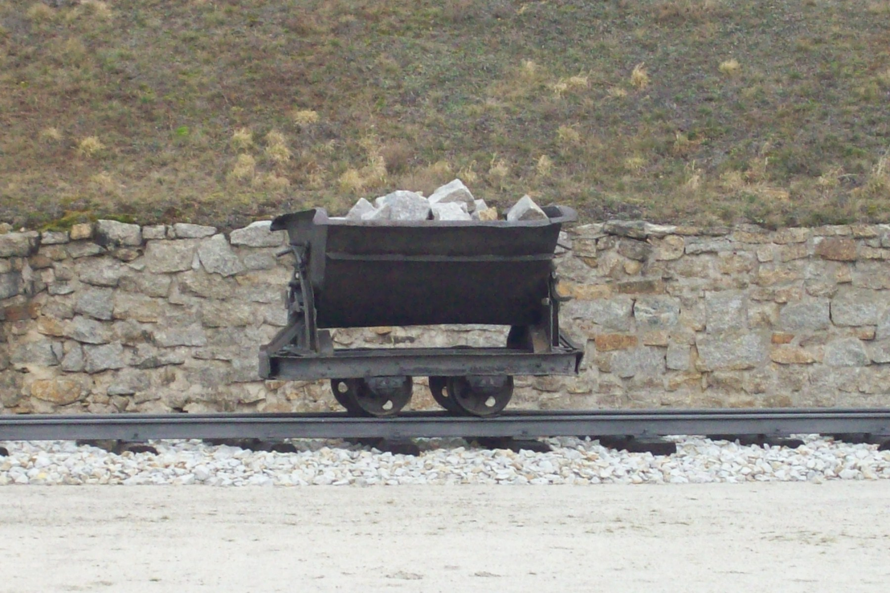 Takimi wózkami więźniowie przewozili urobek z kamieniołomu